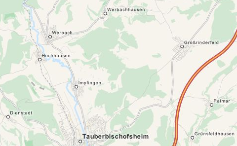 Dieses Bild ist ein Landkartenteil, der aus der Landkartendatenbank OpenStreetMap übernommen wurde. Im Bild ist Impfingen (ein Stadtteil von Tauberbischofsheim) mit seinen Nachbargemeinden (Tauberbischofsheim, Hochhausen, Werbach und Großrinderfeld) zu sehen. In "rot" ist ein Ausschnitt der Bundesautobahn 81 zu sehen. Von Süd nach Nord verläuft der Fluss Tauber, der Taubertalradweg sowie die Taubertalbahn.